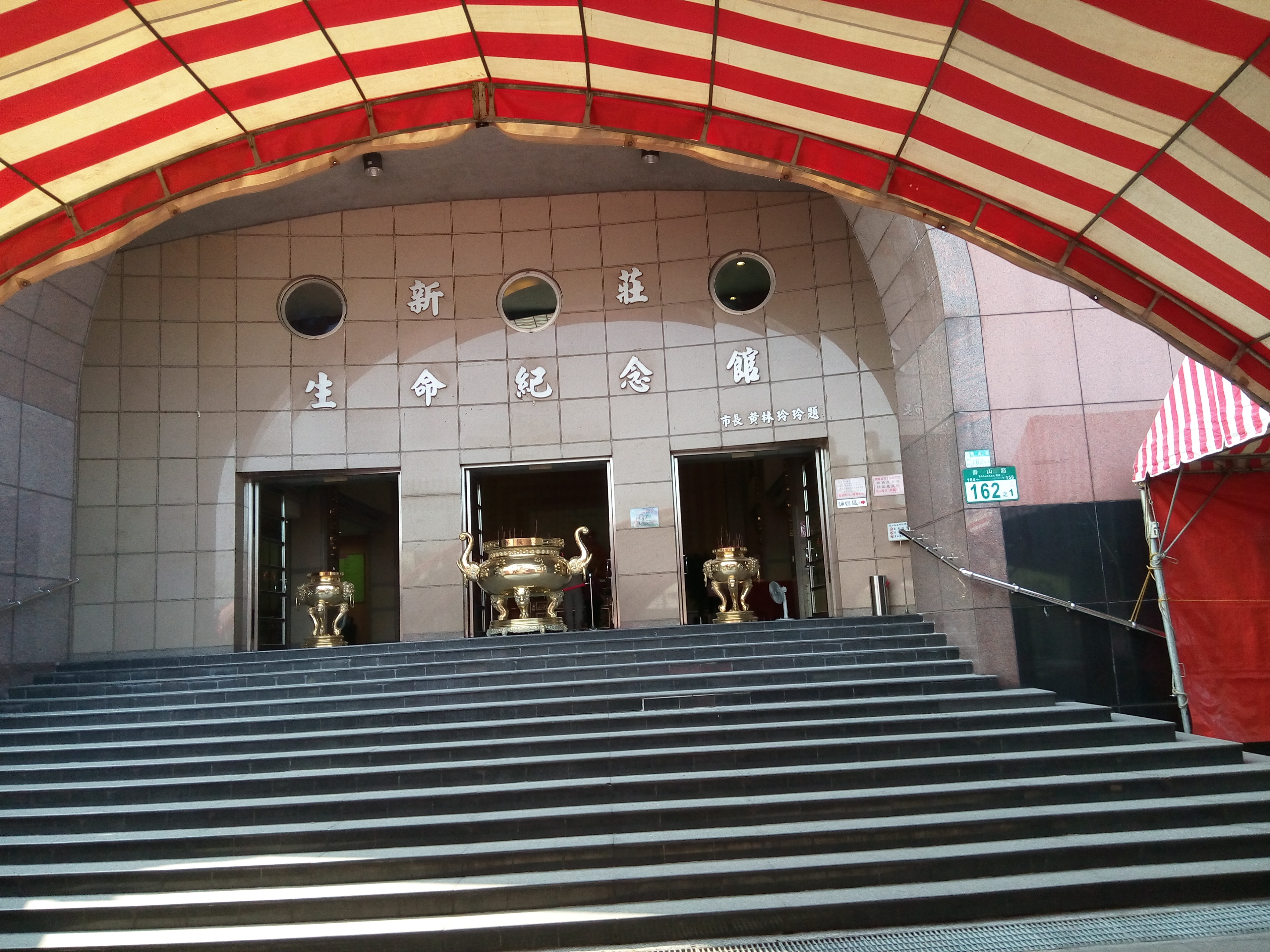 中文（台灣）: 新莊生命紀念館-大門